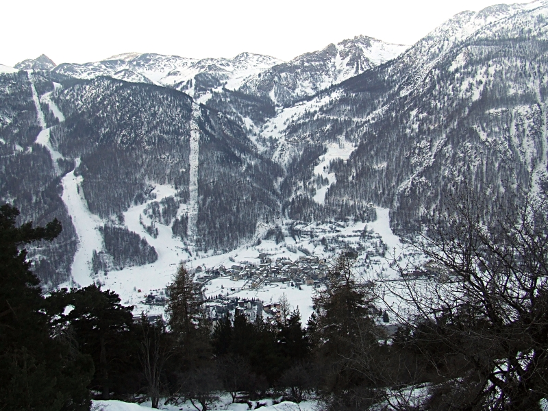 Le hameau de Villeneuve. Commune de la Salle les Alpes (Hautes-Alpes)